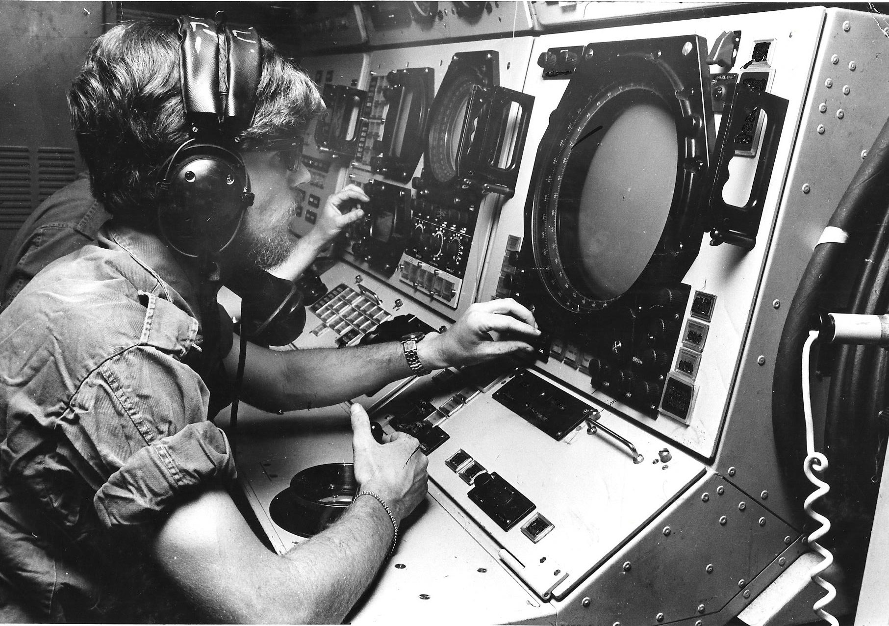 מערכת בקרת אש משולבת לגבריאל (טיל) ותותחים